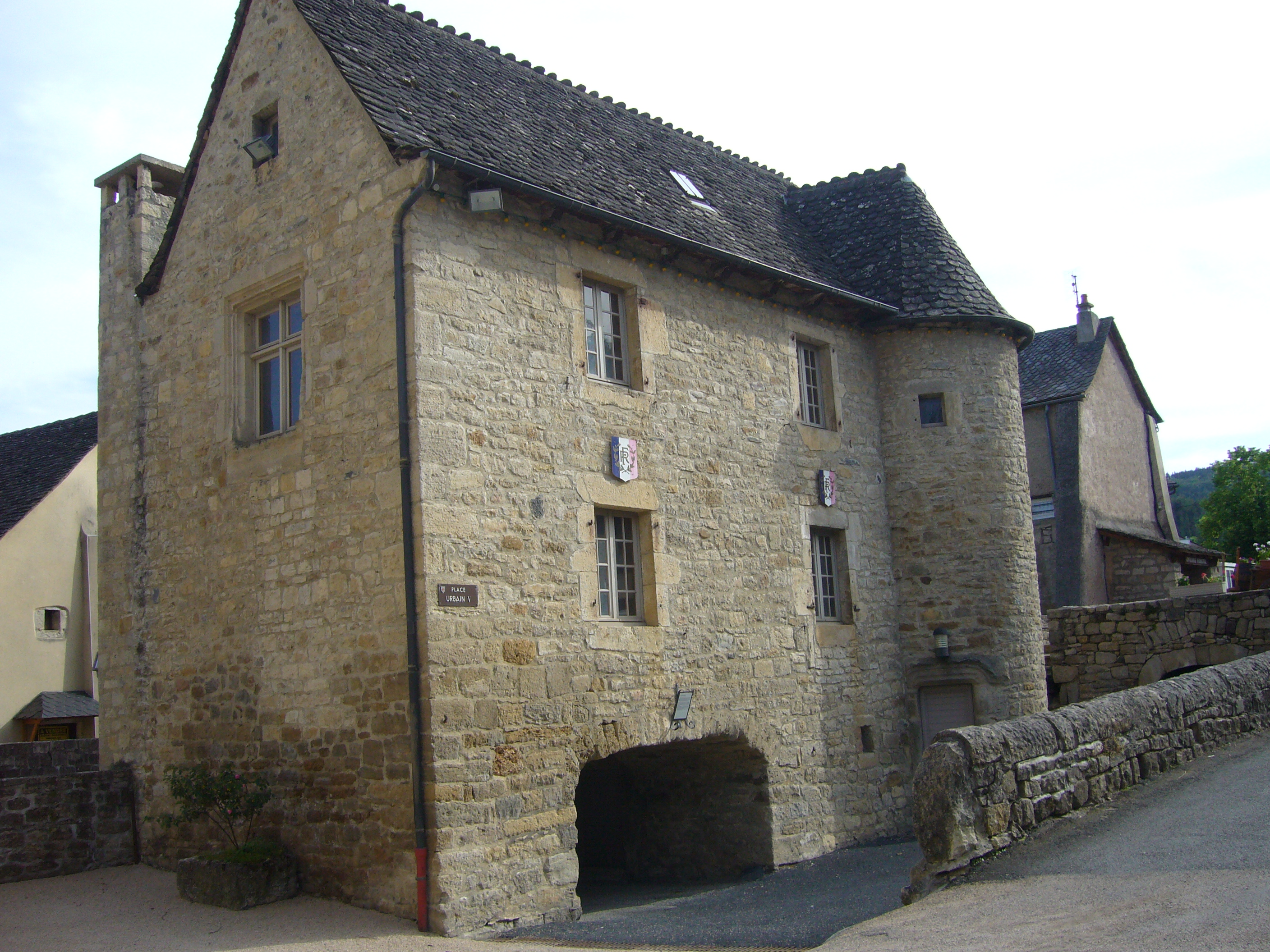 La maison du prieur - mairie (Le Monastier-Pin-Moriès, Lozère, France)